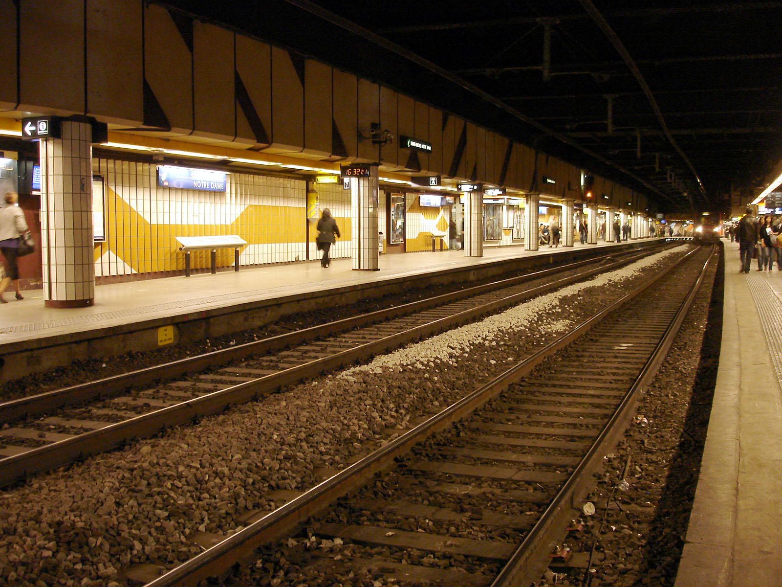 Gare Saint-Michel - Notre-Dame du RER C, Paris, France. Vue en direction d'Invalides.